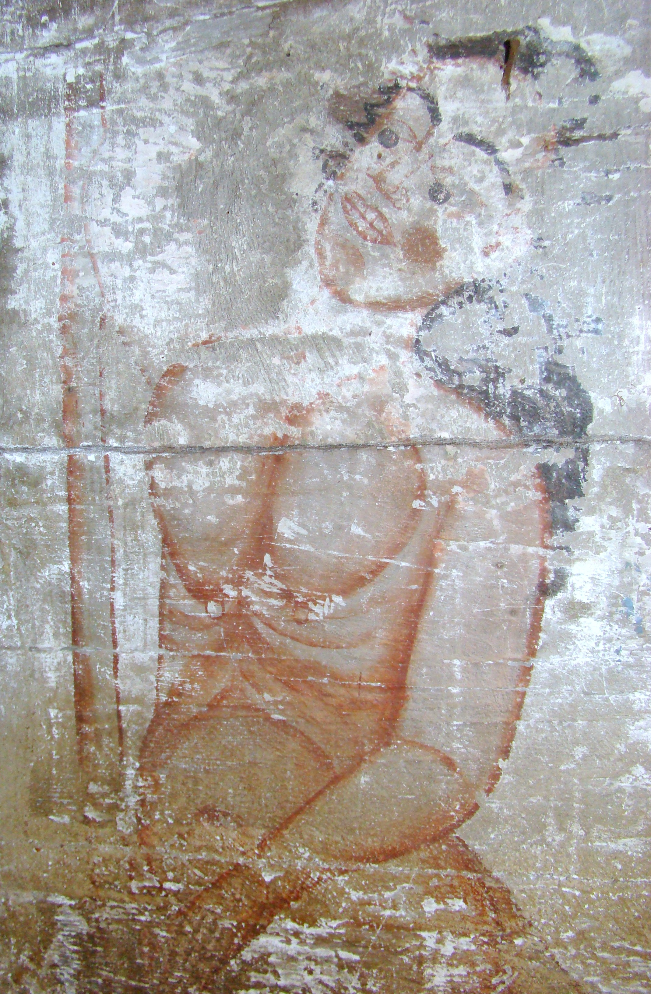 Biserica de lemn "Sfinții Arhangheli Mihail şi Gavriil" din Chieșd, județul Sălaj